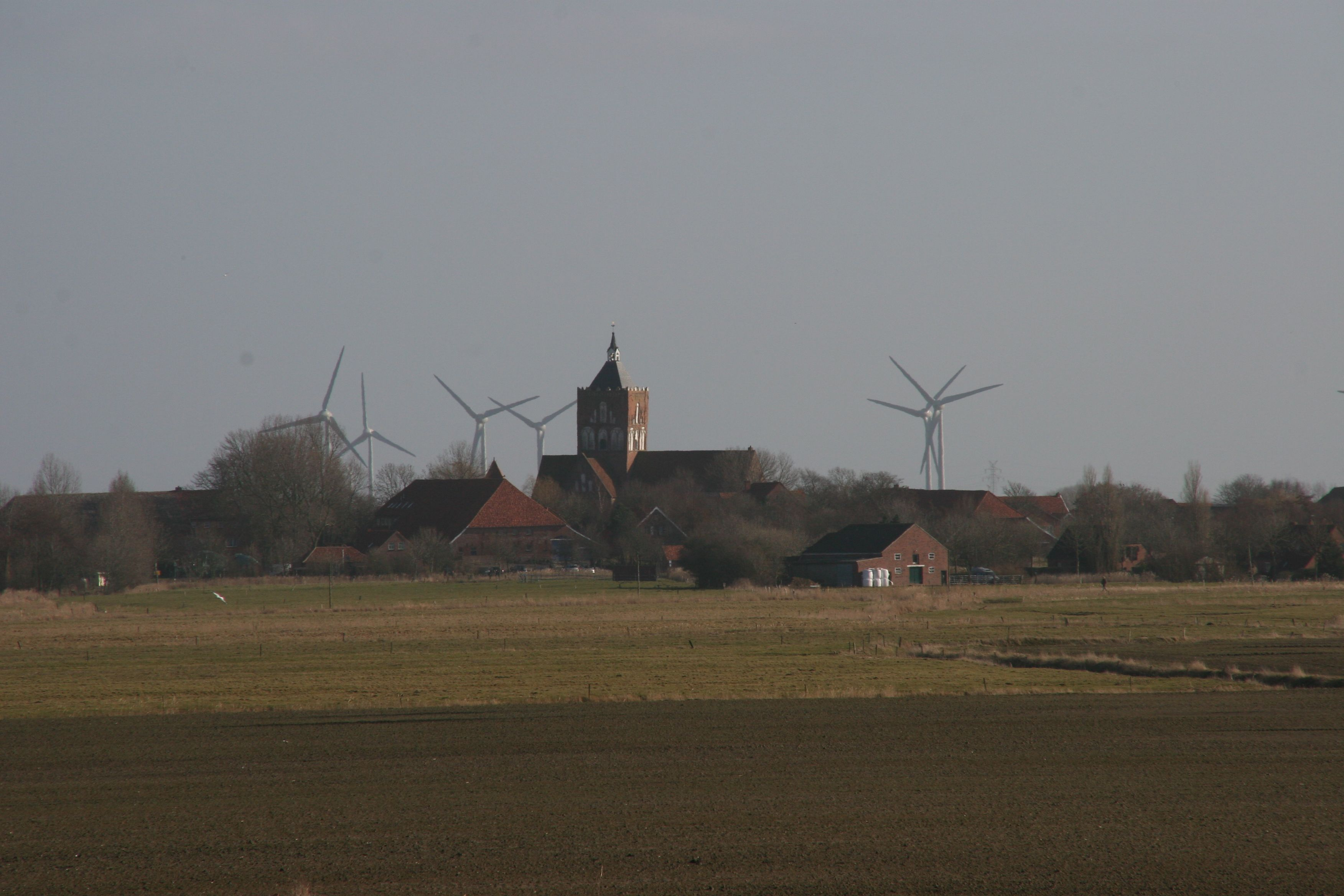 Pilsum